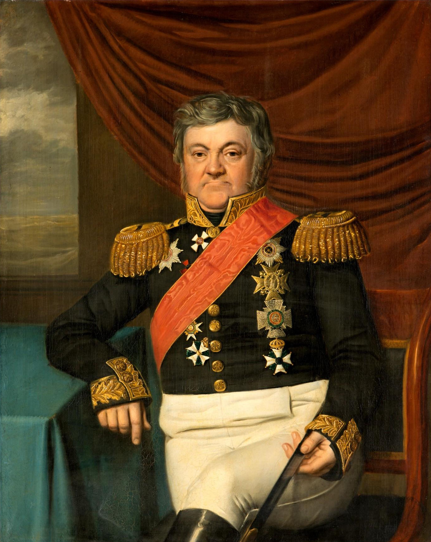 Lodewijk Sigismund Vincent van Heiden (1773-1850)